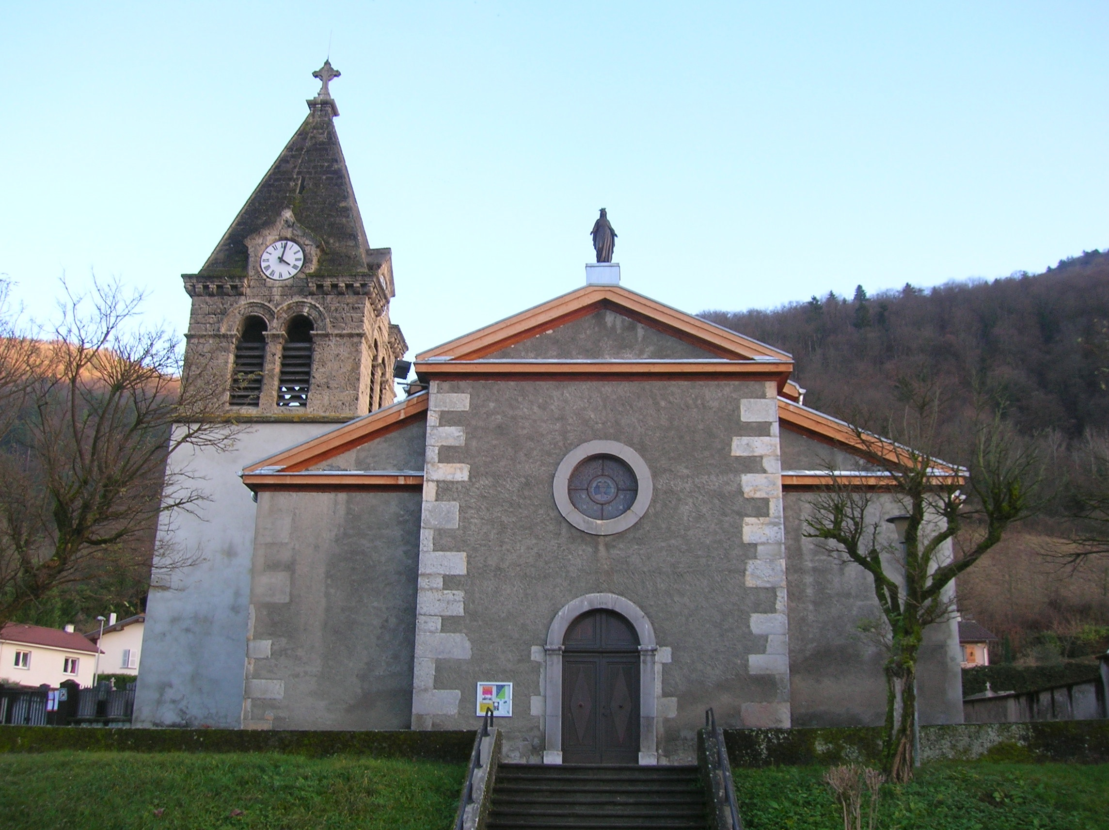 église, Le Versoud, Isère, Rhône-Alpes, France.